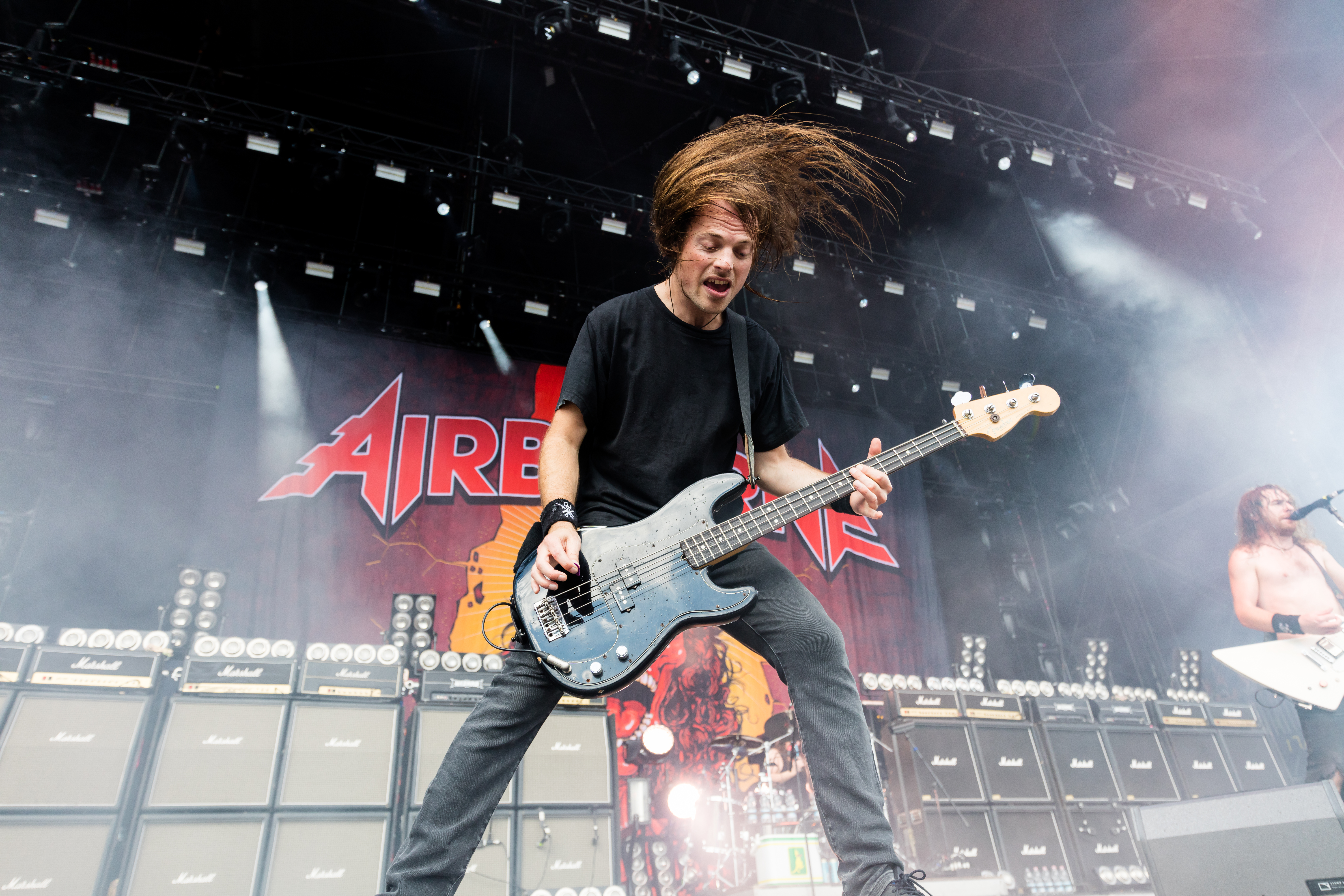 Airbourne during Rock am Ring at Nürburgring, Nürburg, Rheinland Pfalz, Germany on 2017-06-04, Photo: Sven Mandel